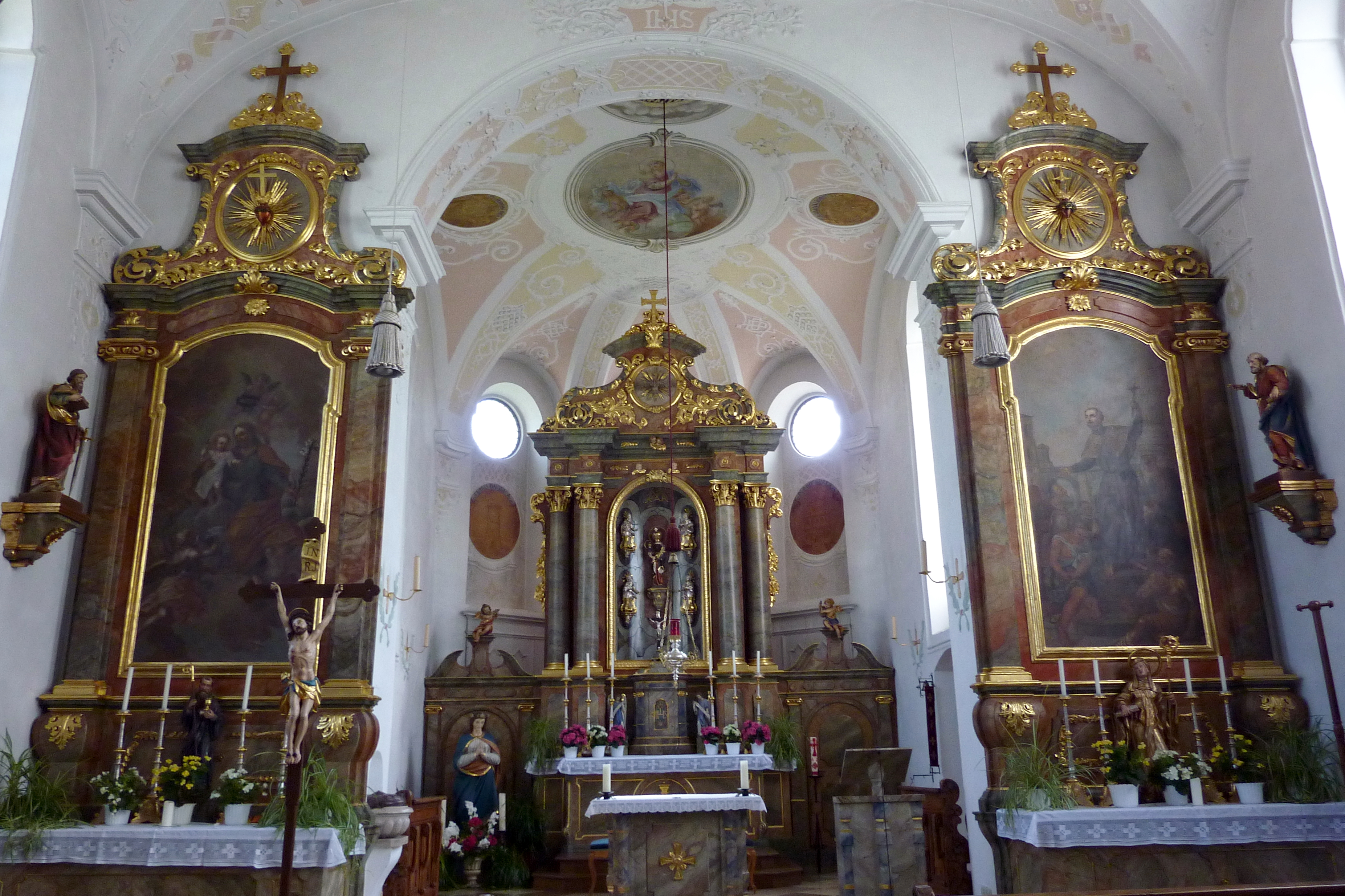 Katholische Pfarrkirche St. Maria Immaculata in Echenbrunn, einem Ortsteil von Gundelfingen im Landkreis Dillingen an der Donau (Bayern), Hauptaltar und Seitenaltäre